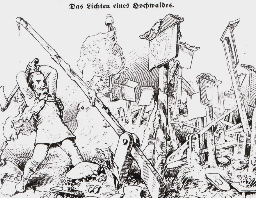 Karikatur zu Kleinstaaterei in Deutschland (zeitgenössische Darstellung „das Lichten eines Hochwaldes“, Illustration aus „Fliegende Blätter“ (satirische Zeitschrift, erschienen in München), Jg. 1847, bd. 6, nr. 140, s. 157.)